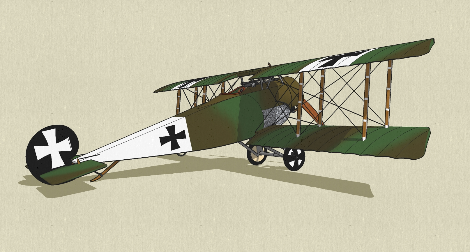 modèle 3D réalisé sur sketchup